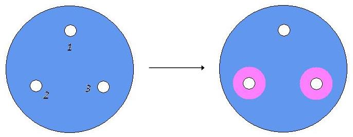 creé le 12/07/2006